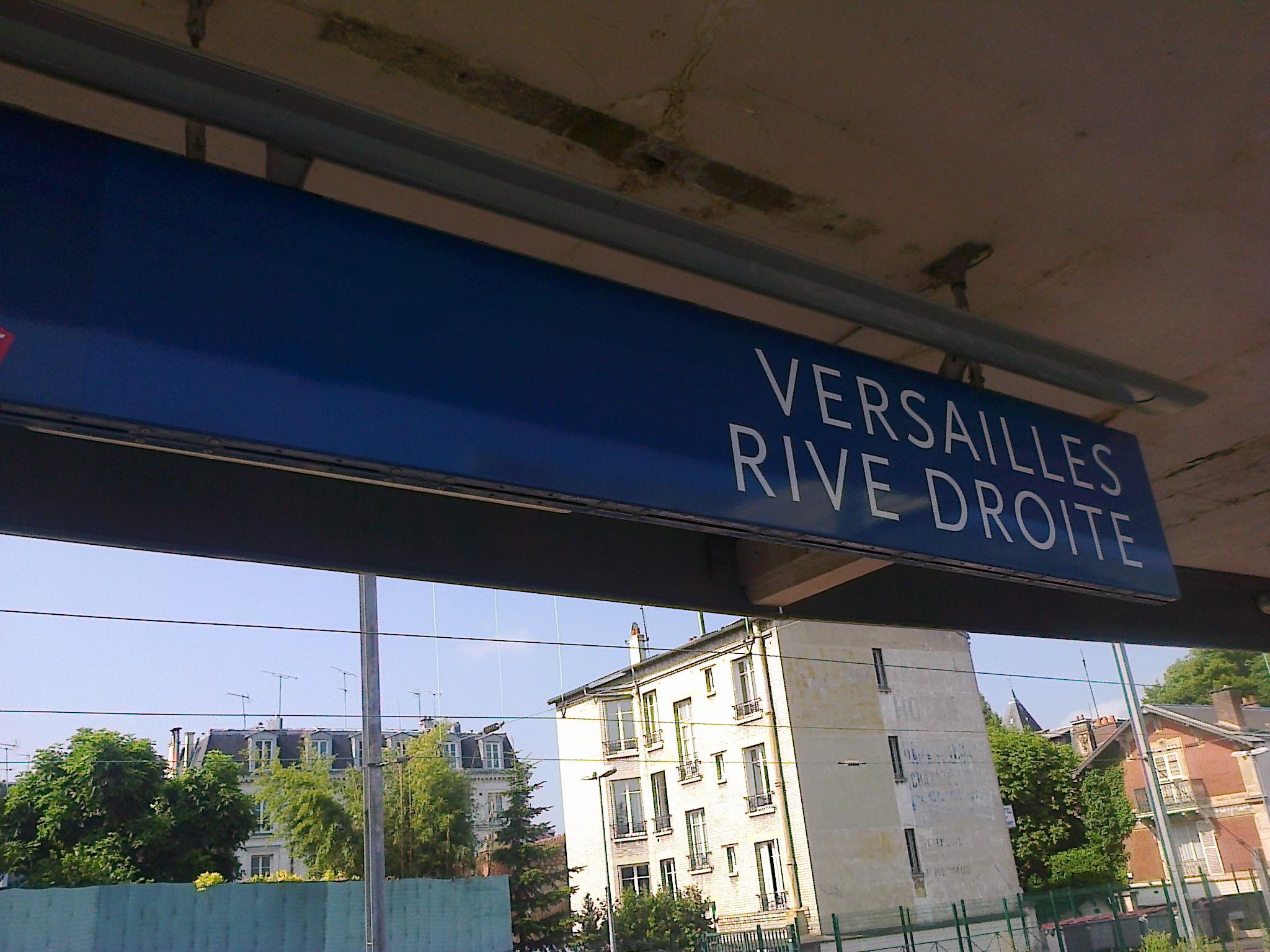 Panneau indicateur à la gare de Versailles-Rive-Droite, Yvelines, France.